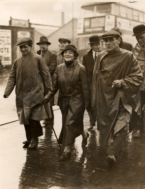 Ellen Cicely Wilkinson à la tête des Jarrow Marchers dans le district de Cricklewood à Londres